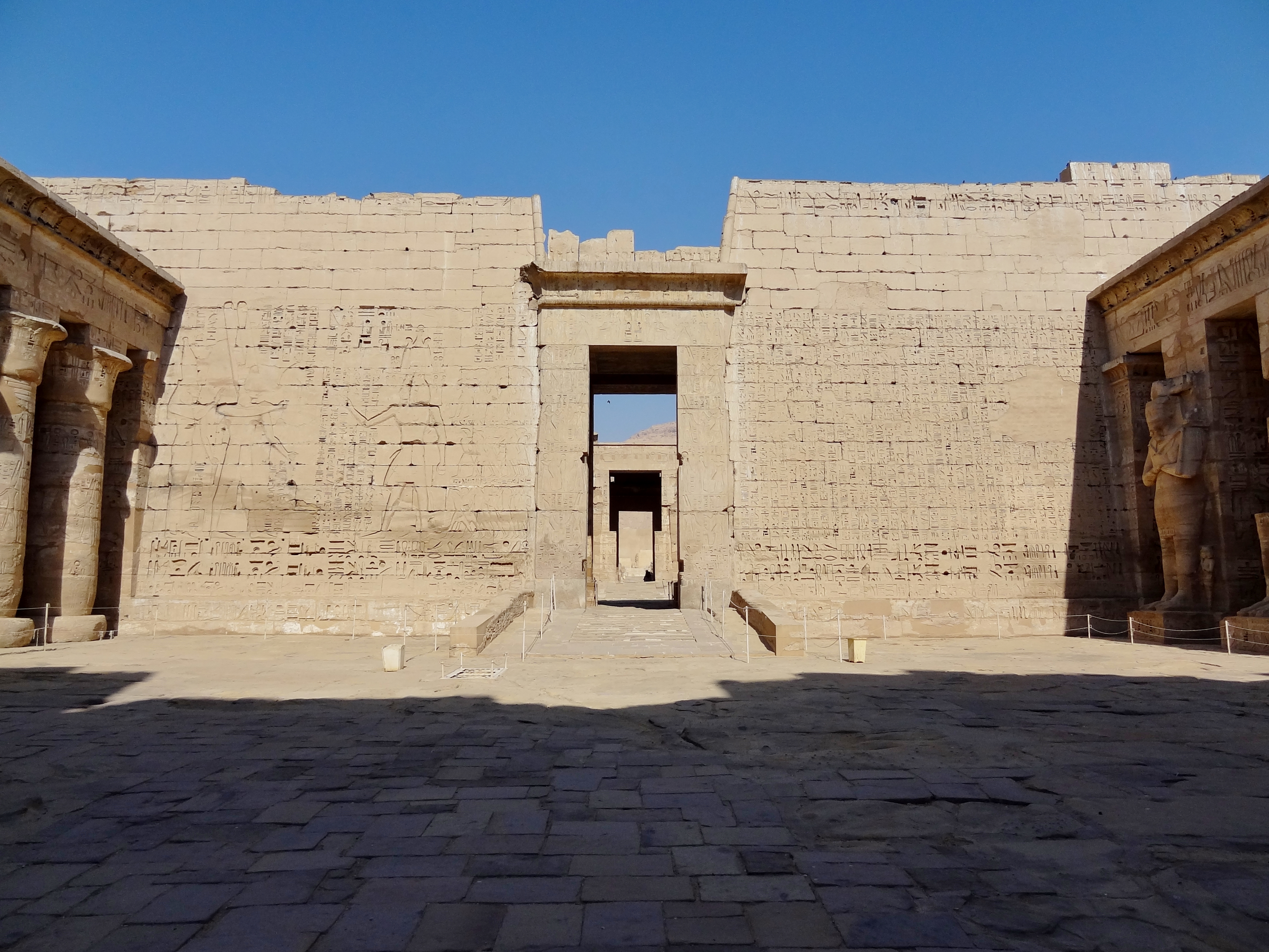 Erster Innenhof des Totentempels Ramses’ III. in Medinet Habu, Ägypten